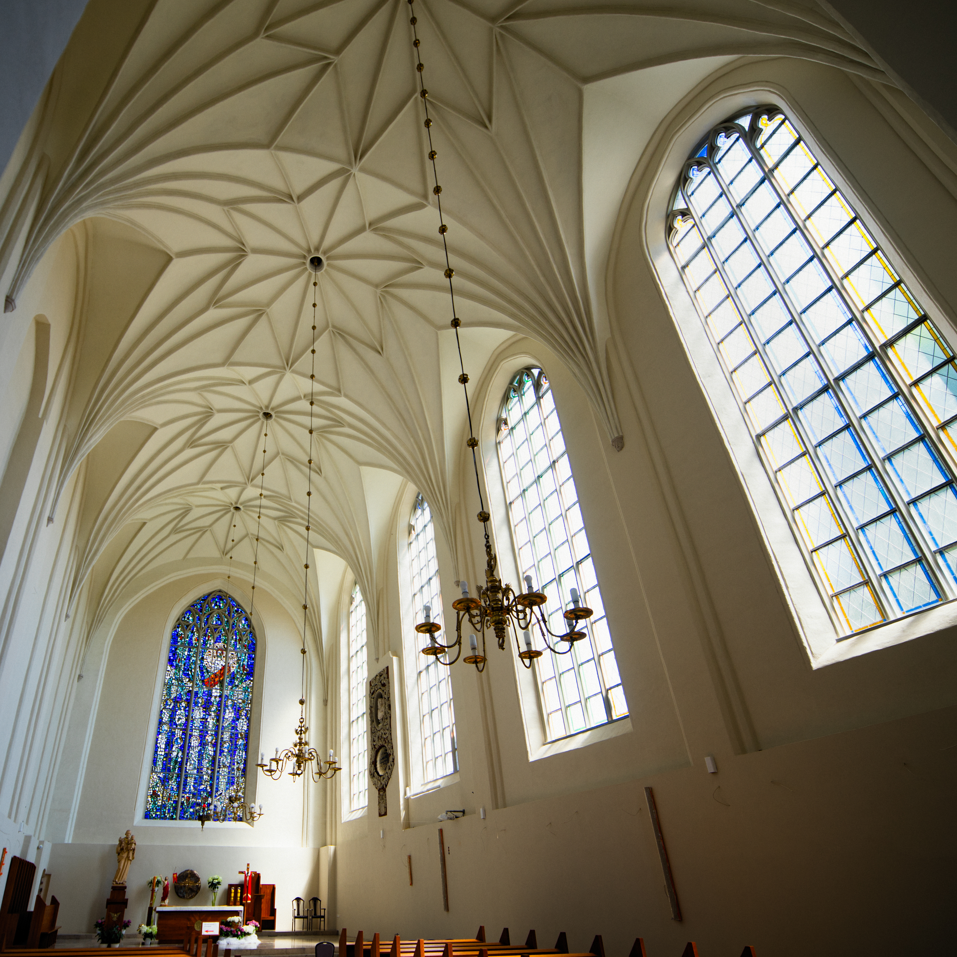 Gdańsk, Kościół św. Józefa w Gdańsku